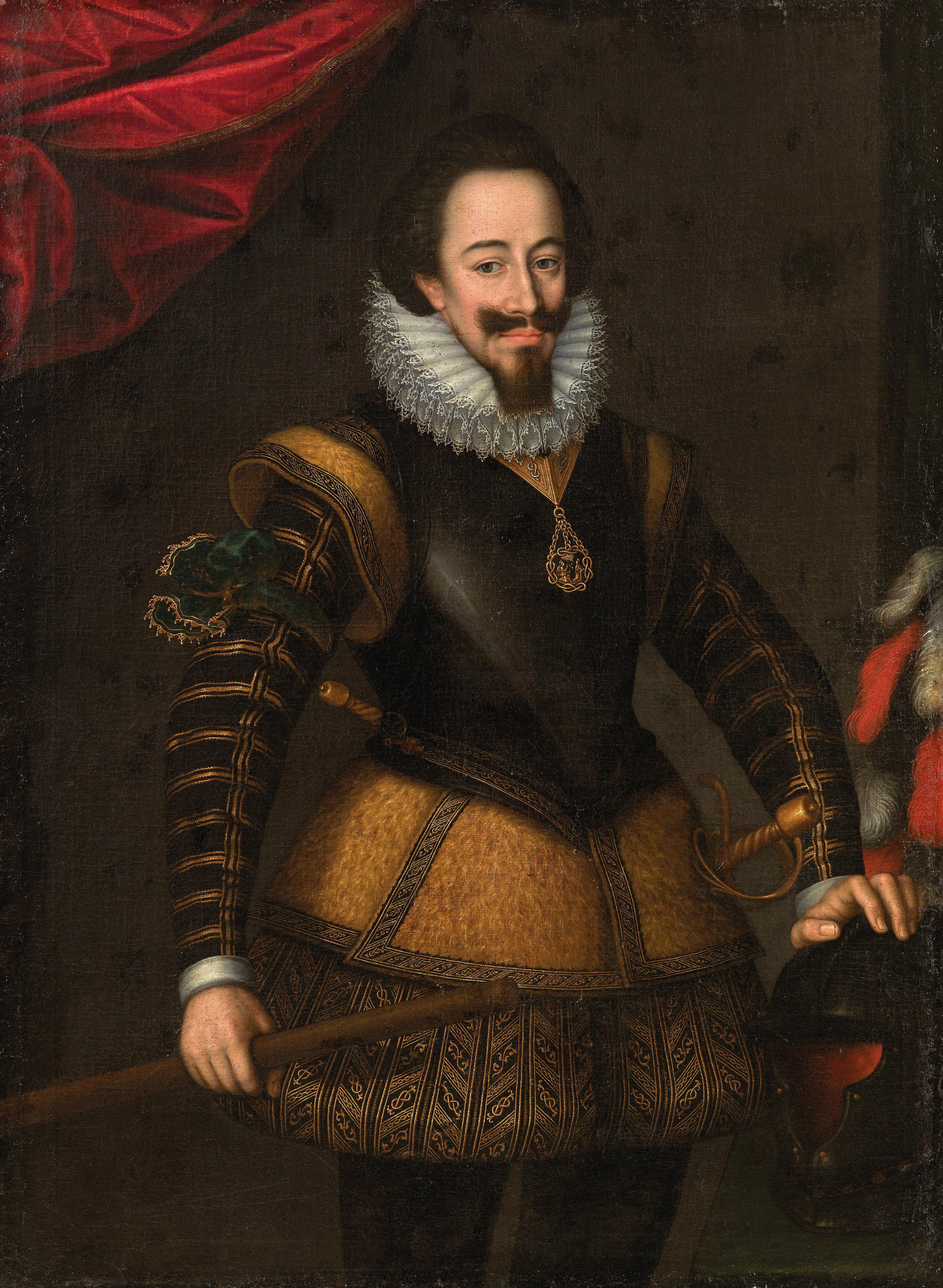 Bildnis des Herzog Karl Emanuel I von Savoyen